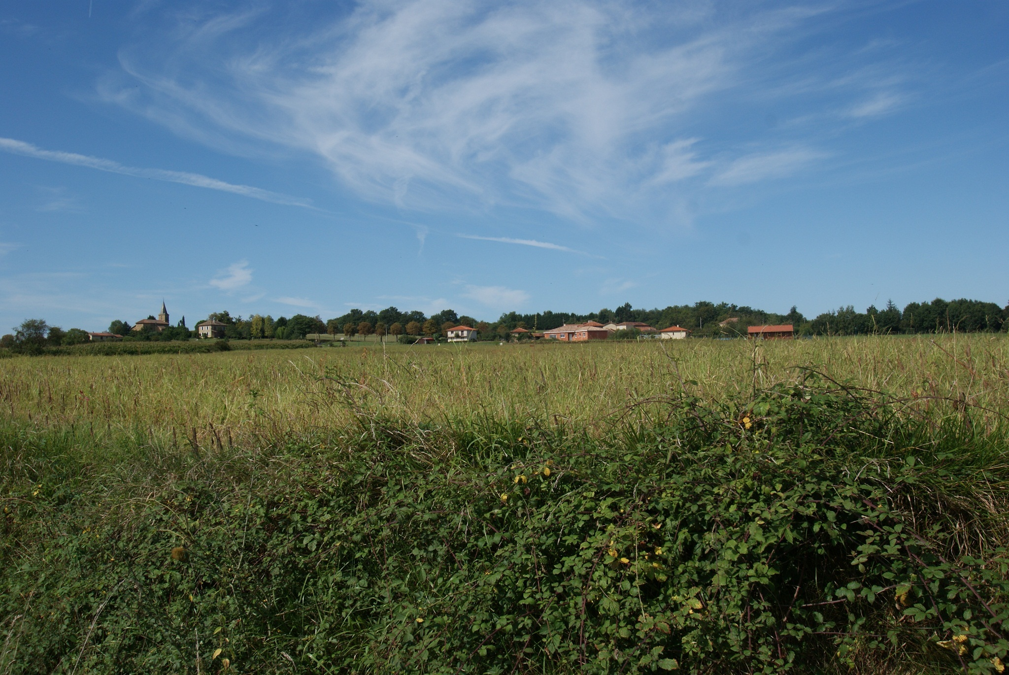 Het dorp.